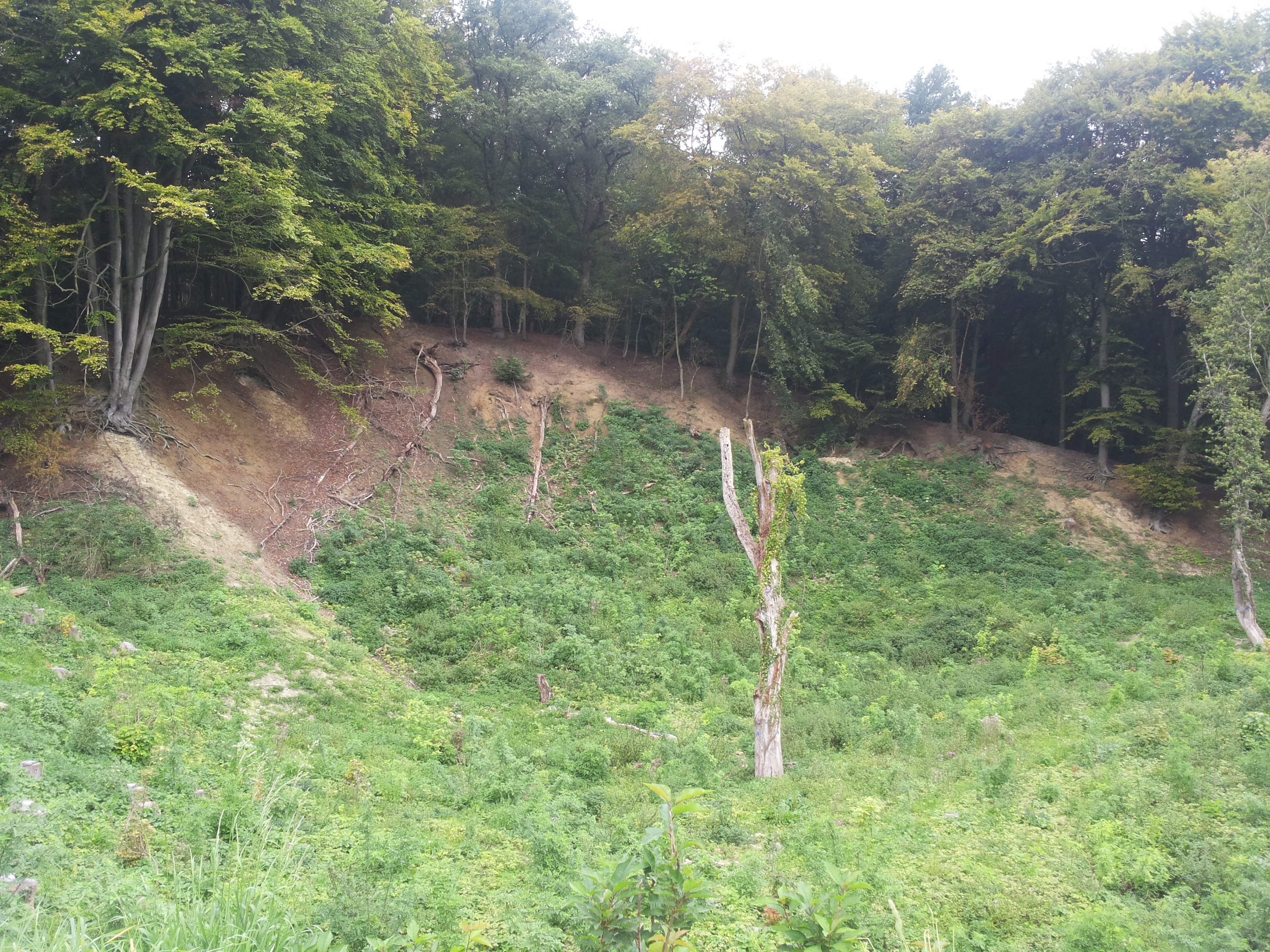 Krijtrots van Heimans bij het Onderste Bosch bij Epen, Limburg, Nederland